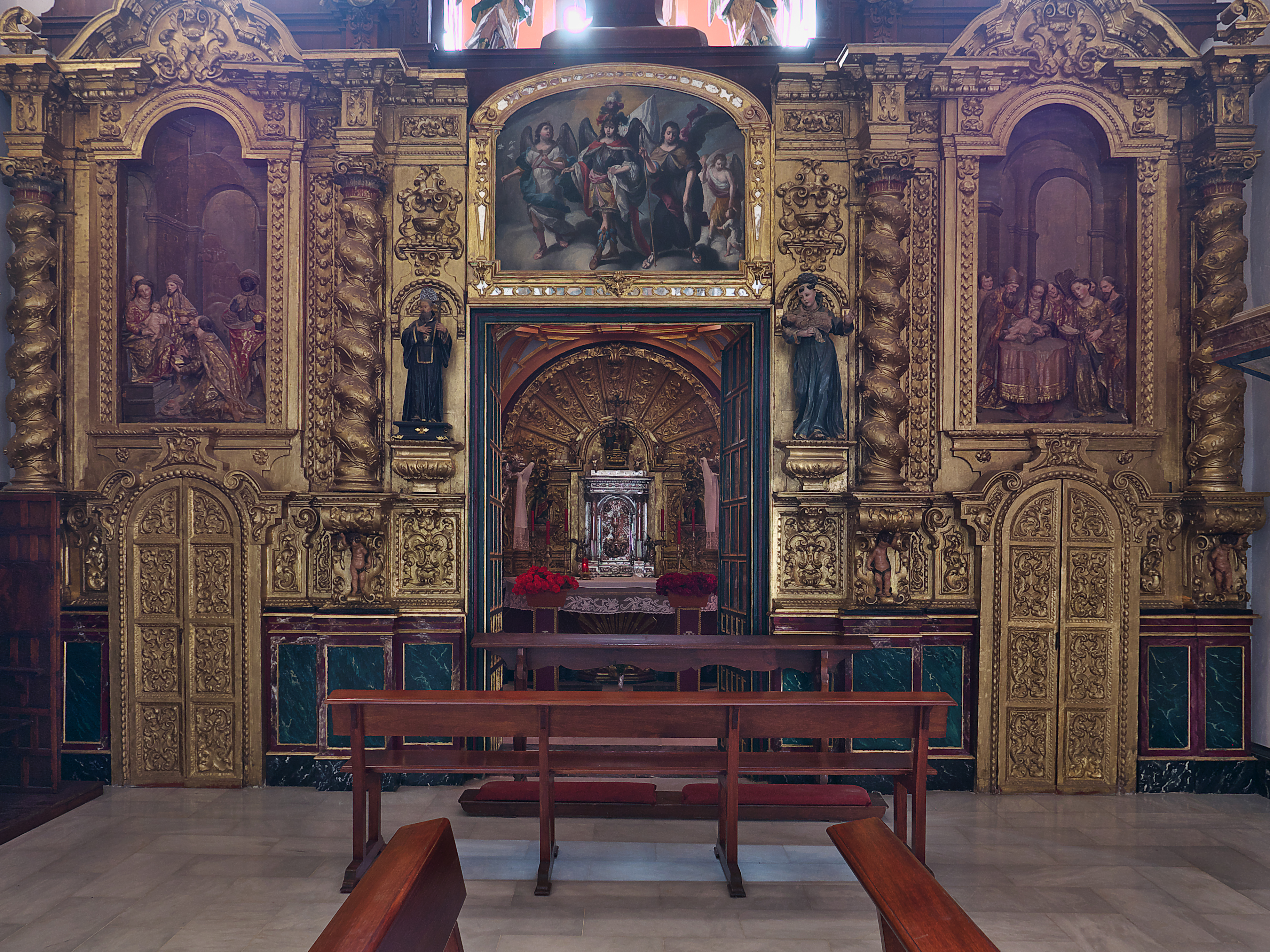 Capilla sacramental de la Iglesia de San Juan (Écija). Retablo atribuido a Cristóbal de Guadix.